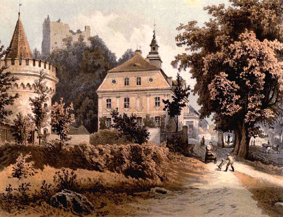 Burg und Schloss Greiffenstein, Kreis Löwenberg, Provinz Schlesien